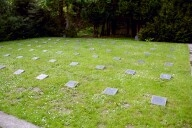 Soldatengräber WK II in Stralsund